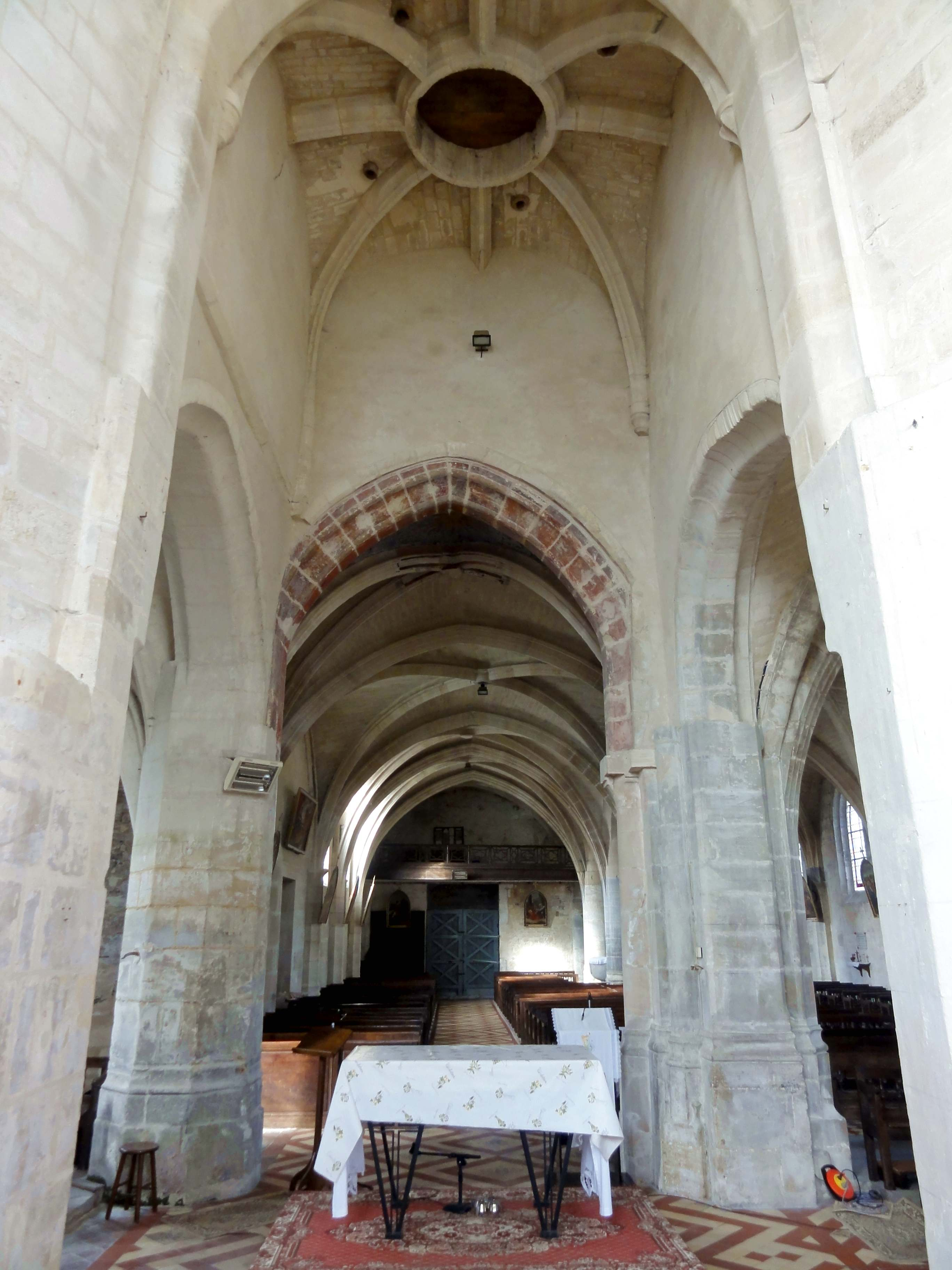 Voir titre.